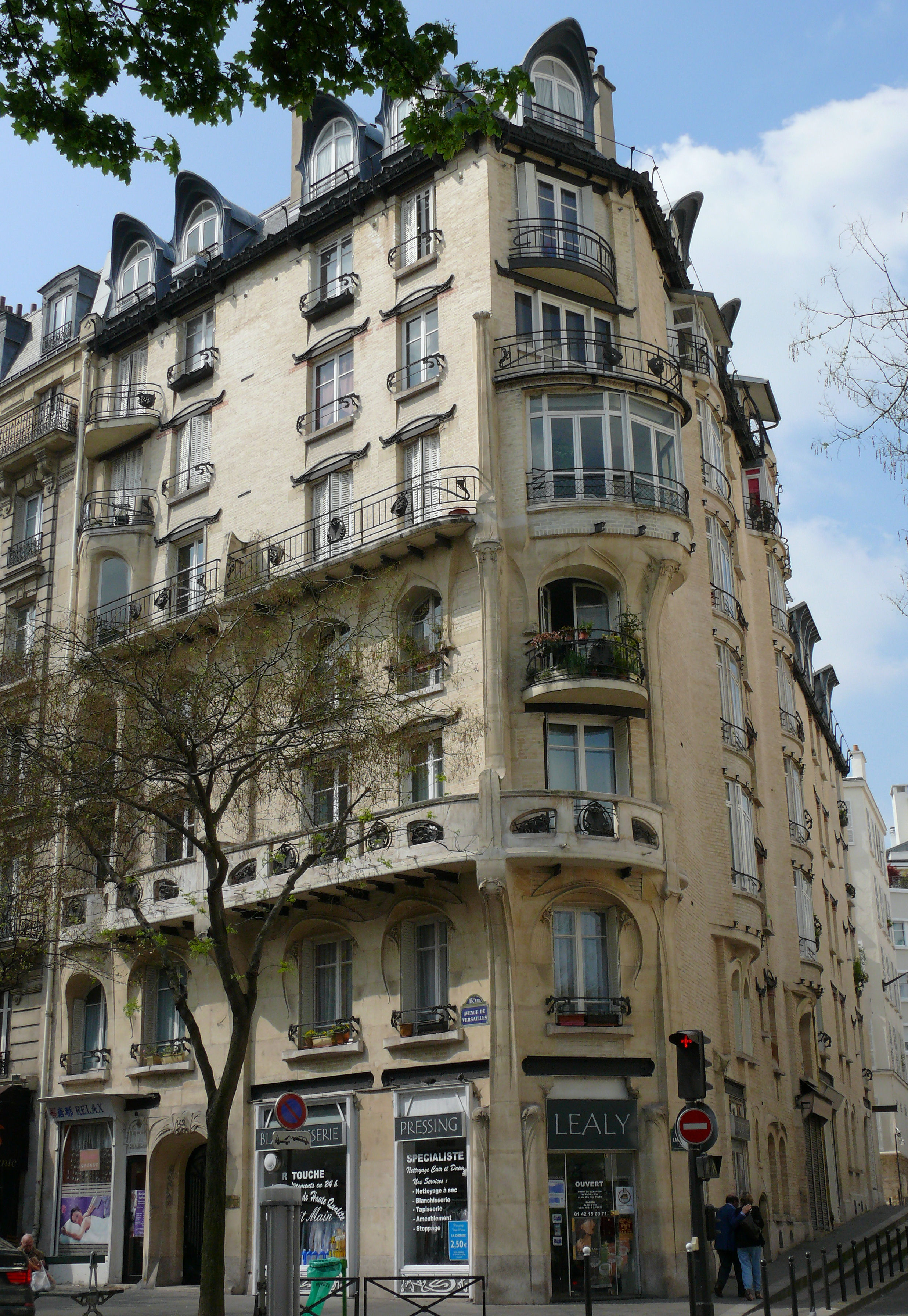 Paris 16 - Immeuble Jassédé